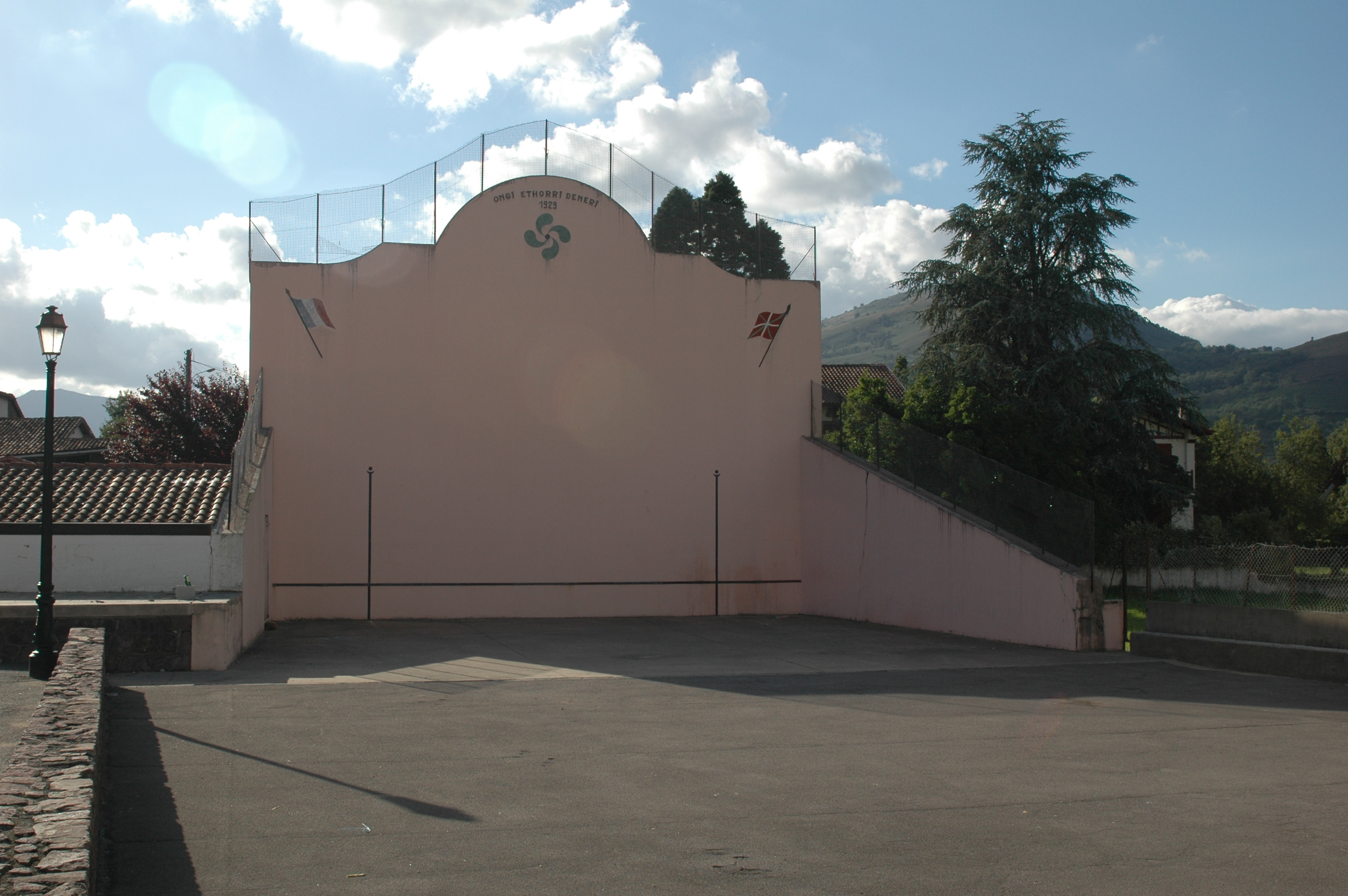 Ascarat, le fronton. Photo prise le 03/08/06 par Harrieta171